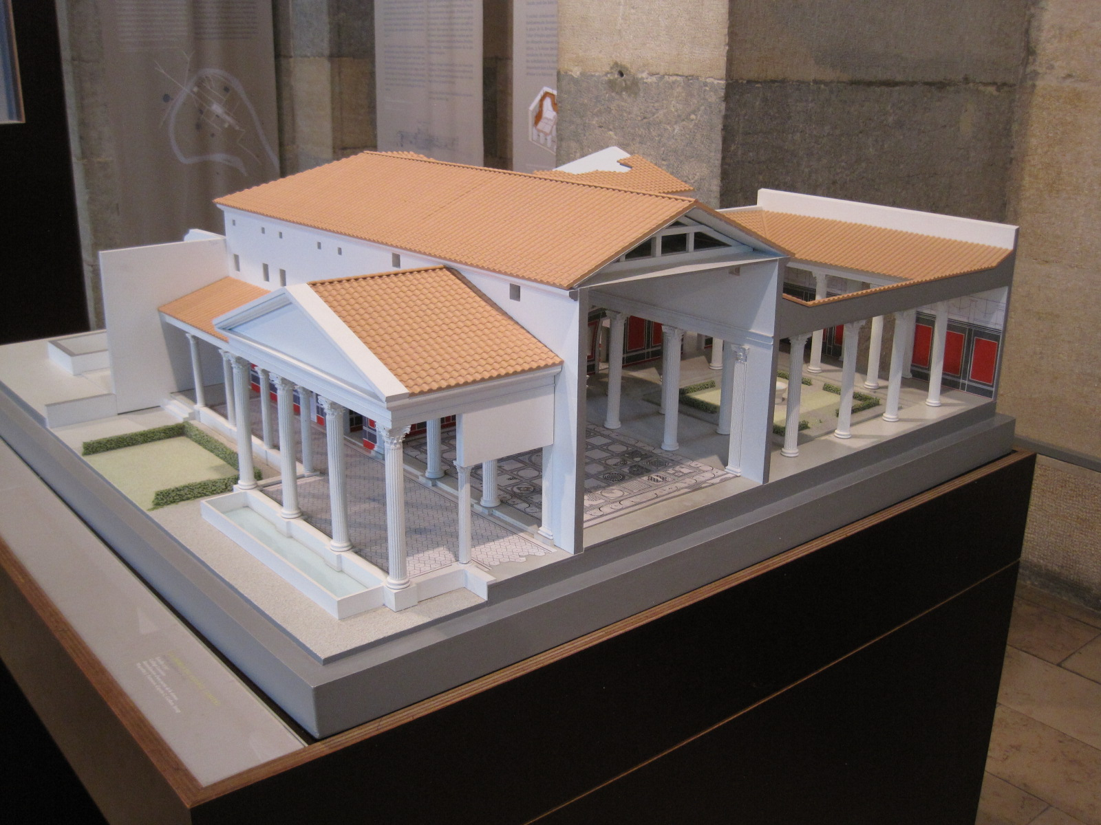 Maquette de domus gallo-romaine de Besançon - Archéologie au Musée des Beaux-Arts de Besançon